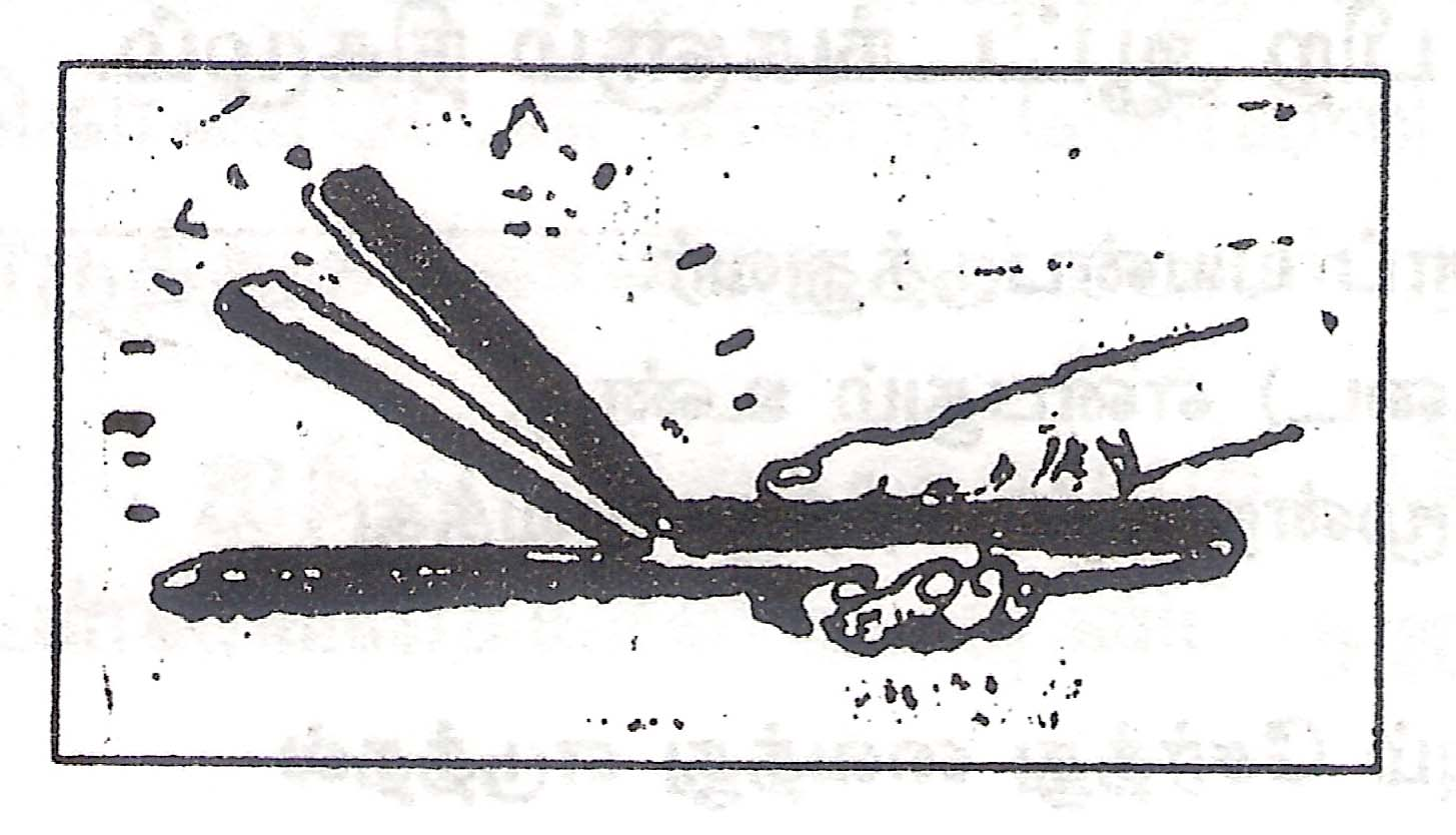 தட்டை என்னும் விளையாட்டுக் கருவி இது. பிள்ளைகள் இதனைப் புடைத்து ஒலியைக் கேட்டு மகிழ்வர். சங்ககாலத்தில் தினை மேய வரும் கிளிகளை ஓட்ட மகளிர் இதனைப் புடைத்தனர். - என் நூல் 'மறைகின்ற விளையாட்டு' பக்கம் 90-ல் உள்ள படம் இங்குப் பதிவேற்றப்பட்டுள்ளது.